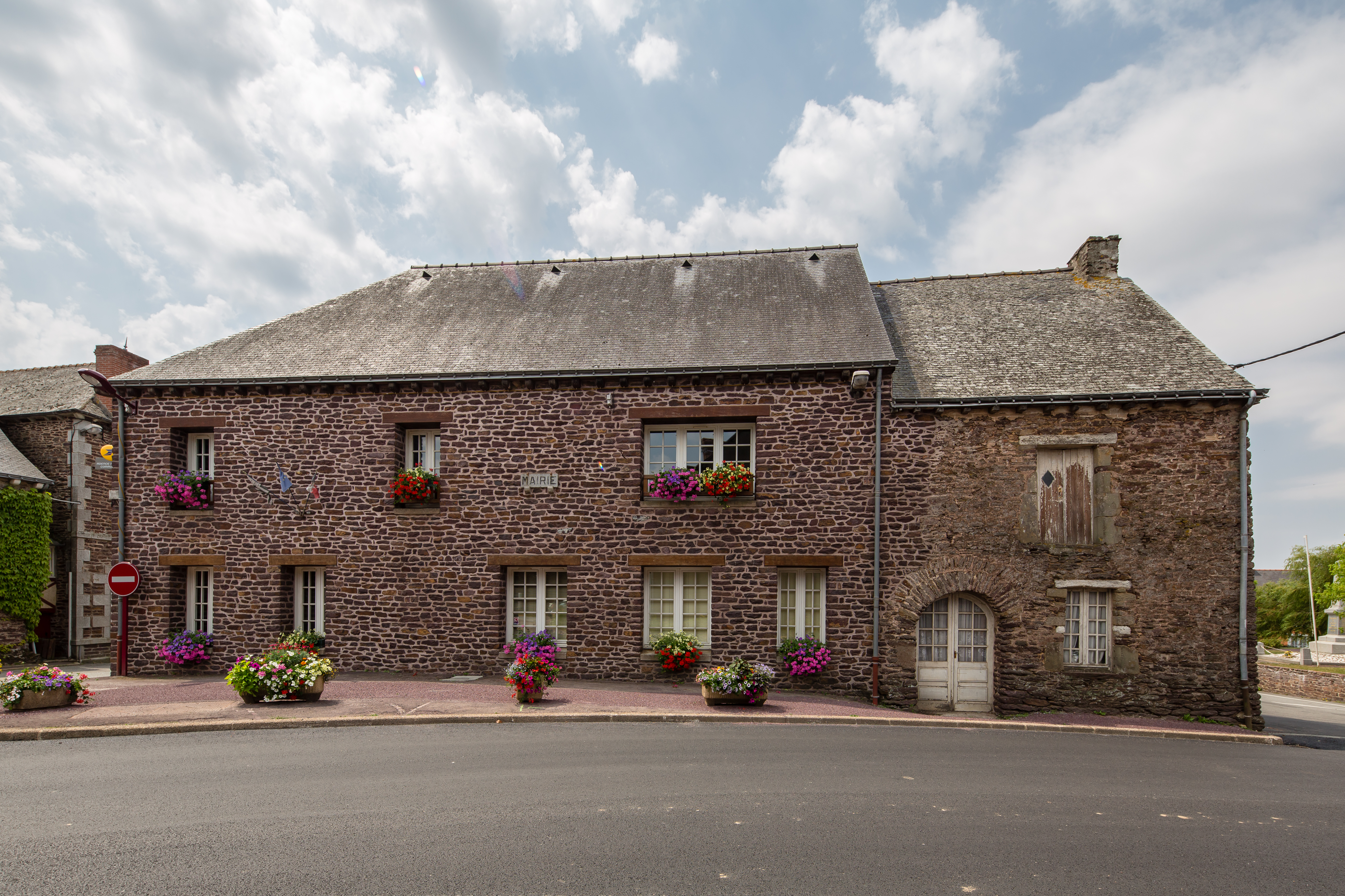 Mairie de Concoret (France).